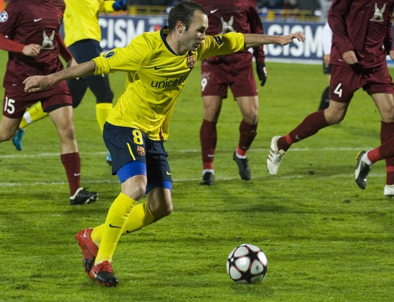 Andrés Iniesta, en Liga de Campeones ante el Rubin Kazan.